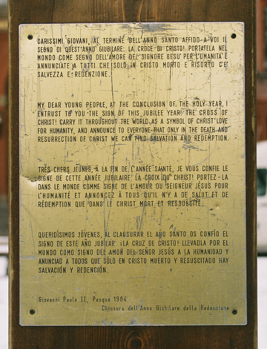 Plakette auf dem Weltjugendtagskreuz grobe Übersetzung Liebe Jugendliche, zum Abschluss des heiligen Jahres vertraue ich euch das Symbol dieses Jubeljahres an: das Kreuz Christi. Tragt es durch die Welt als ein Zeichen der Liebe Christi zu den Menschen und verkündet allen, daß wir allein durch den Tod und die Auferstehung Christi Rettung und Erlösung finden können. Johannes Paul II., Ostern 1984, Abschluss des Jubeljahres der Erlösung